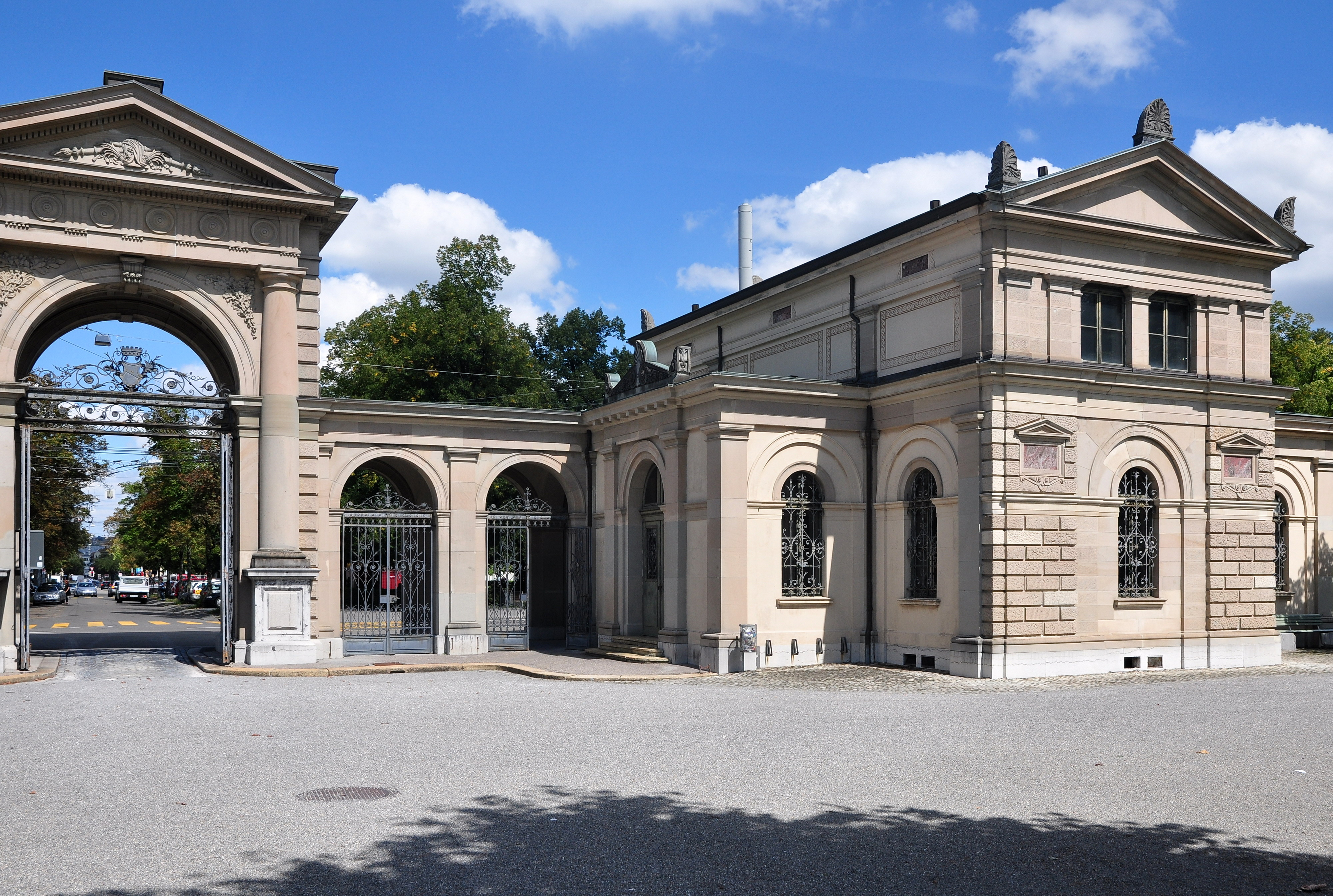 Friedhof Sihlfeld in Zürich-Albisrieden (Switzerland)